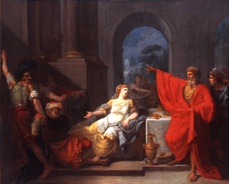 Aman confondu par Esther,title QS:P1476,fr:"Aman confondu par Esther," label QS:Lfr,"Aman confondu par Esther,"